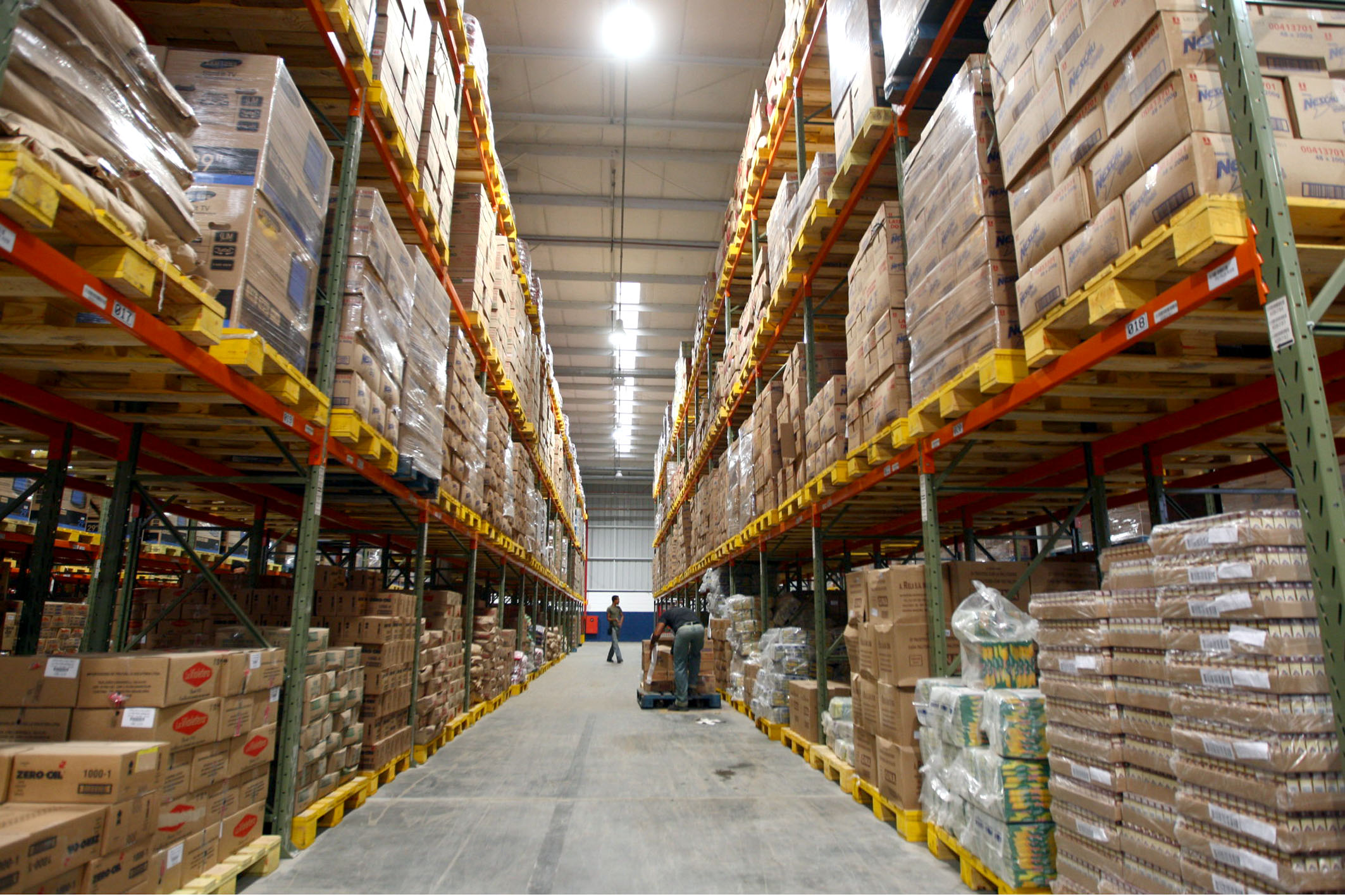 Centro de Distribuição Regional do Grupo Martins em Camaçari (Brasil), inaugurado em 2010.